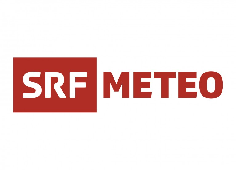 Logo